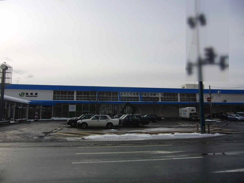 JR東日本の柏崎駅の駅舎です。(改装塗装後)